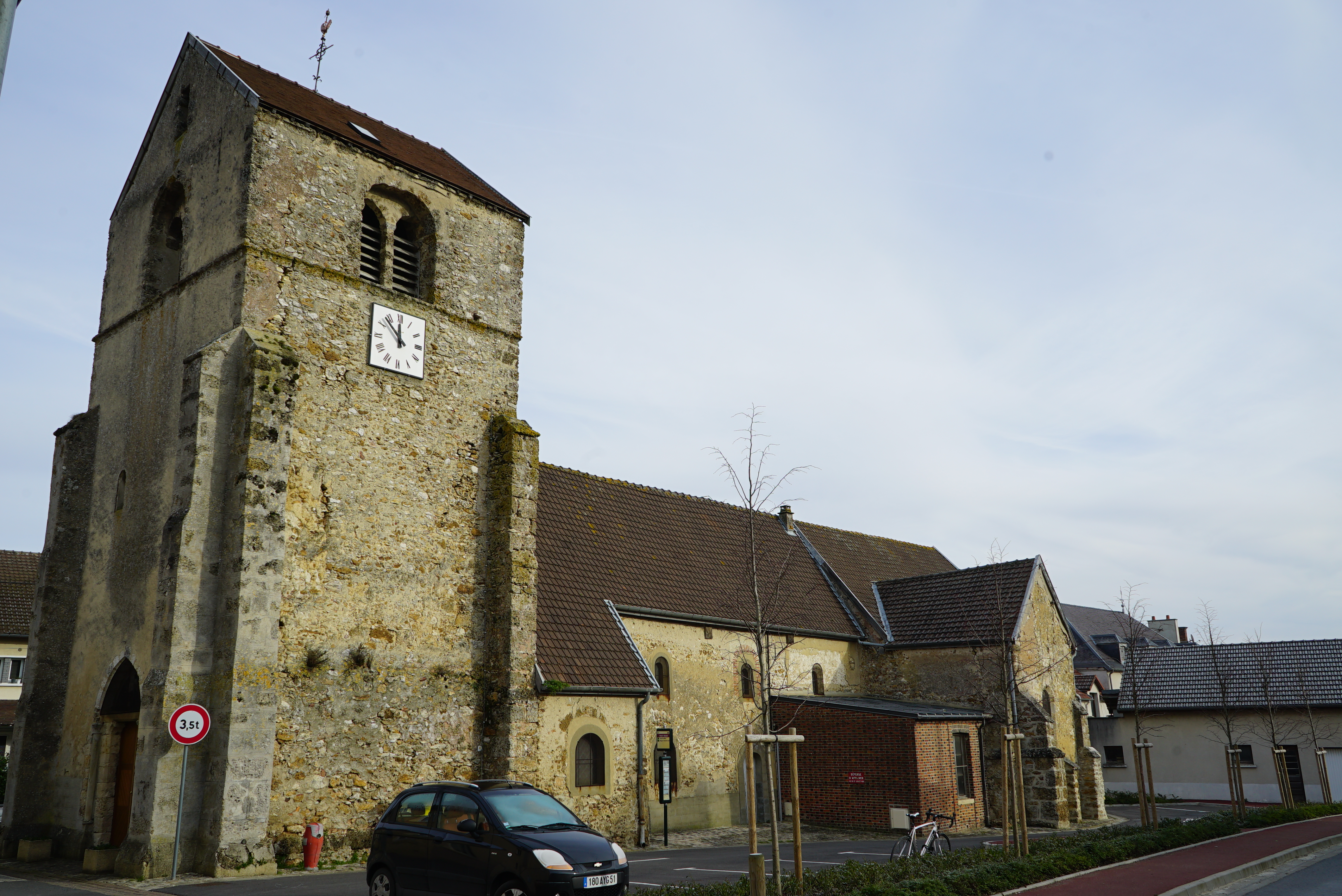 vue dans le village de Vinay